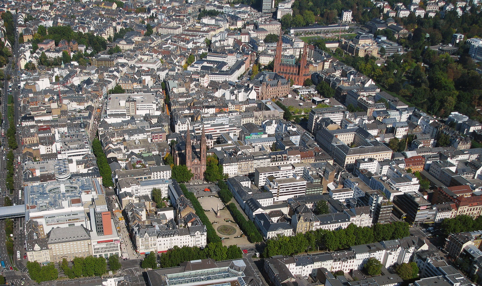 Wiesbaden Luftbild Fünfeck vorne Rheinstraße li Schwalbacher Straße bis re Wilhelmstraße Park am warmen Damm Foto 2008 Wolfgang Pehlemann Wiesbaden IMG_0172